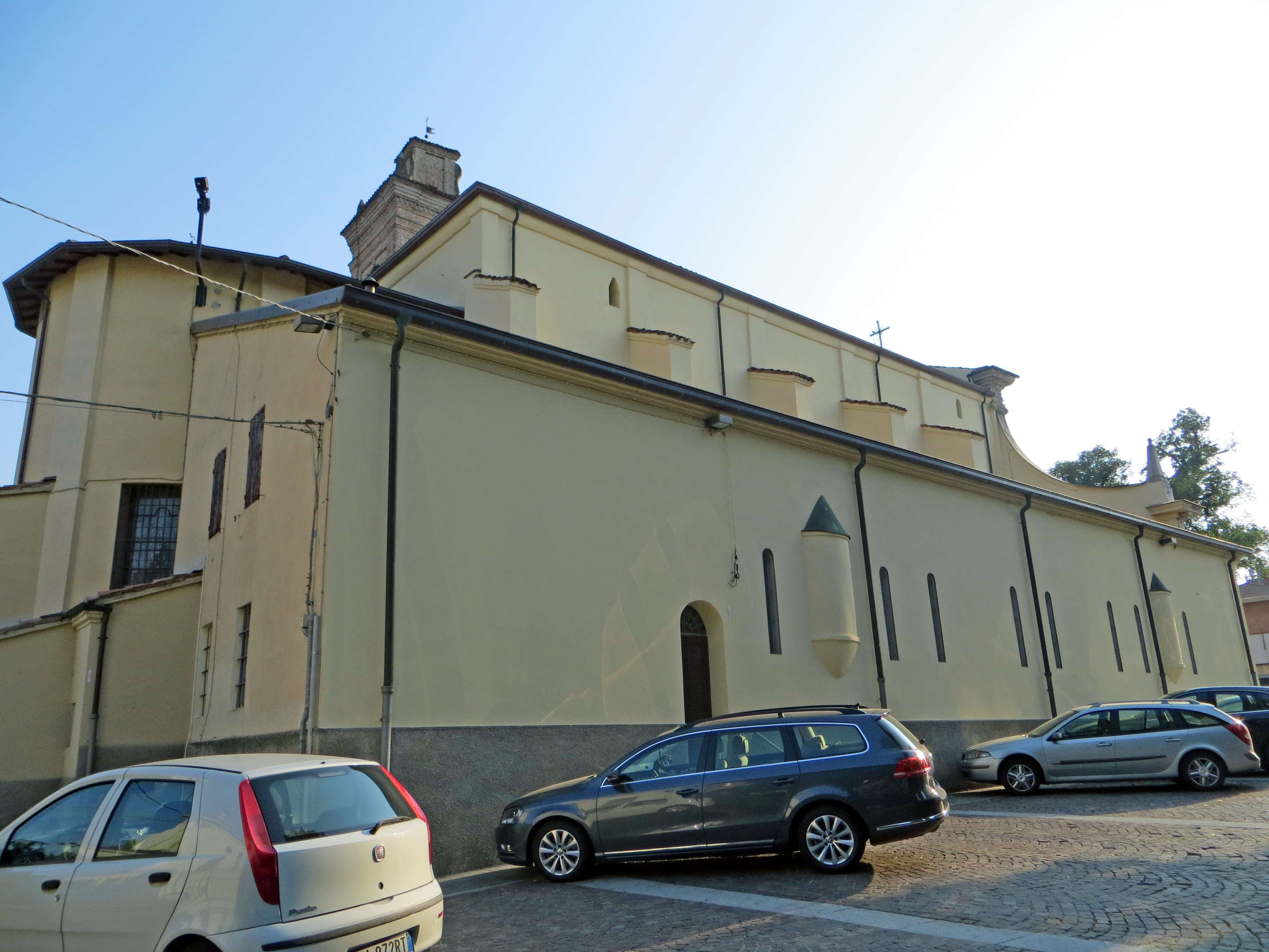 Chiesa di San Martino (Noceto) - lato nord